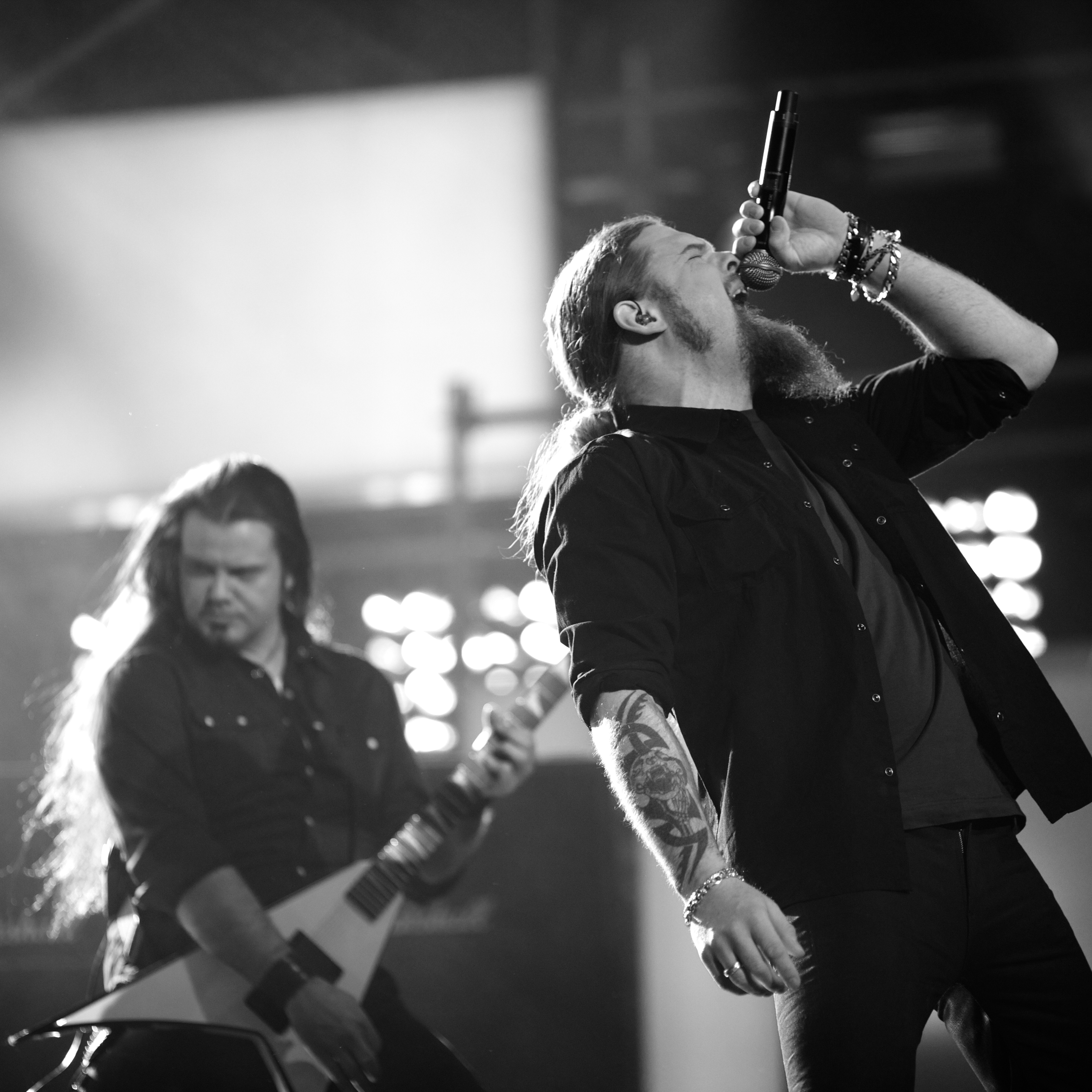 Susperia i Melodi Grand Prix 2011, Skien